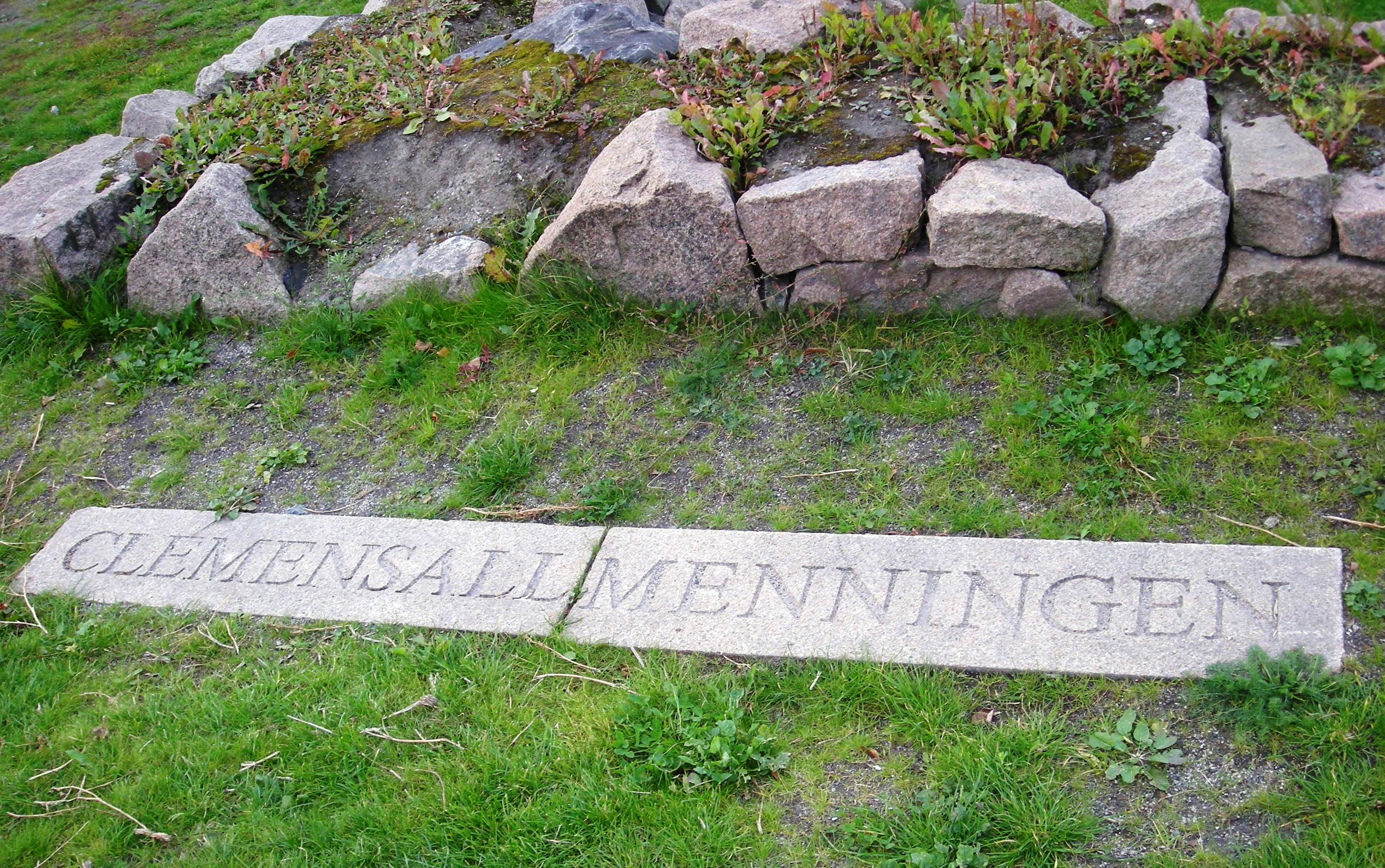 Clemensalmenningen eller Clemensallmenningen: Minne om gammelt gatenavn i Gamlebyen i Oslo